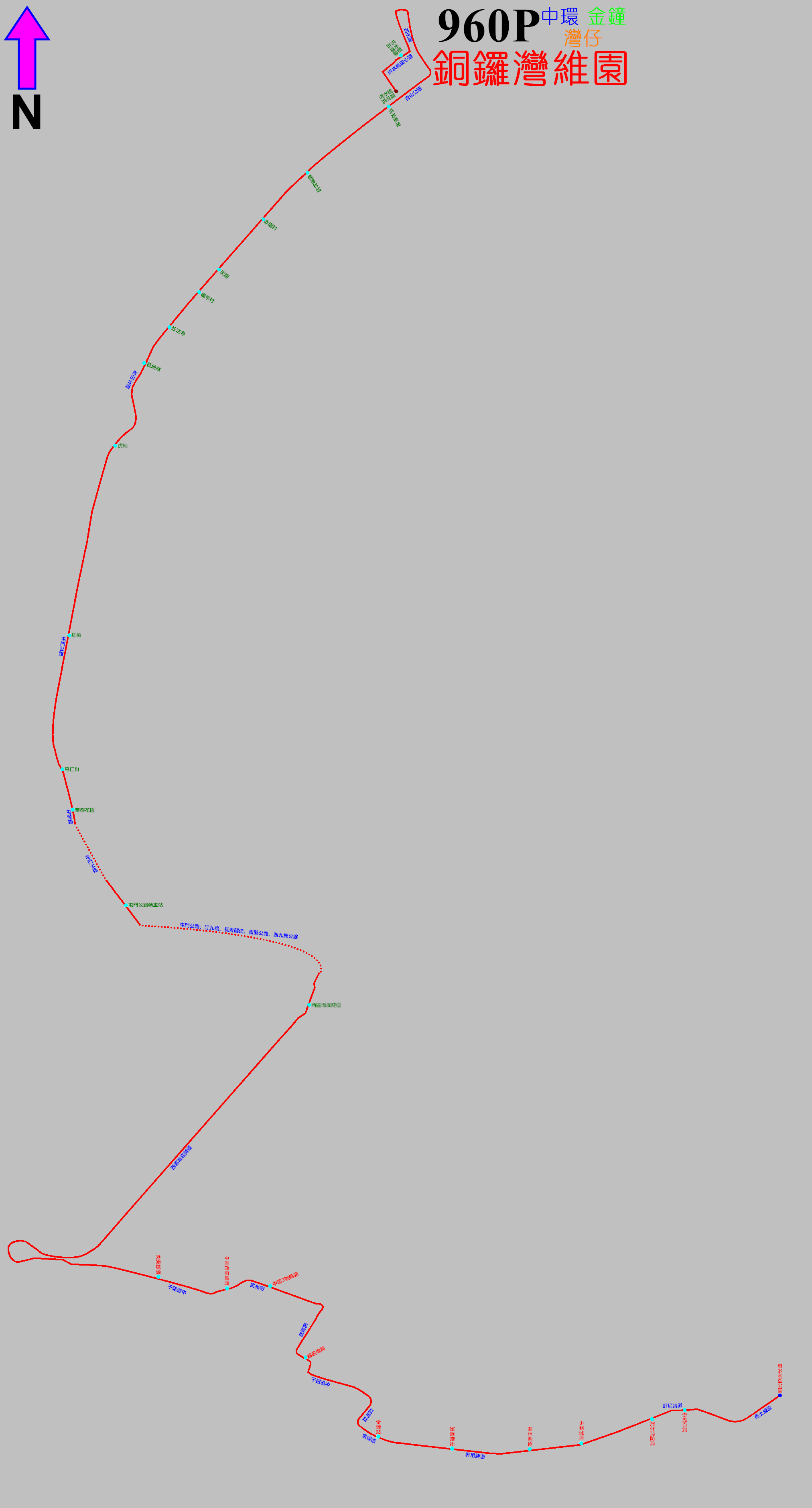 中文（香港）: 過海隧巴960P線的走線圖